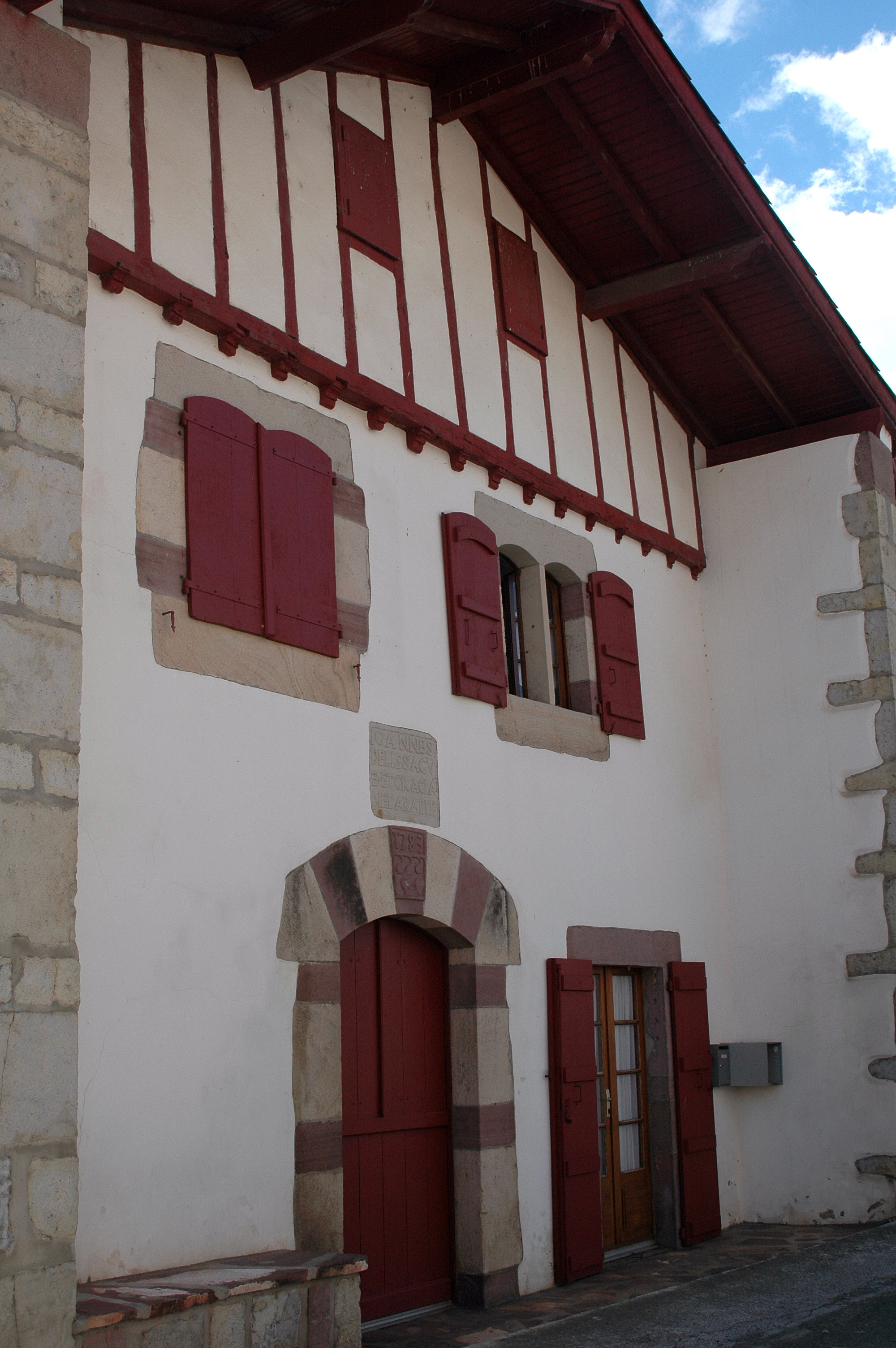 Ossès, maison basque. Photo prise le 03/08/06 par Harrieta171